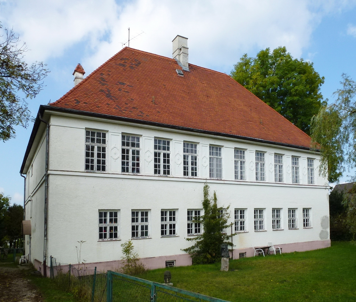 Ehemaliges Schulhaus, errichtet 1909. Ansicht von Süden.This is a photograph of an architectural monument.